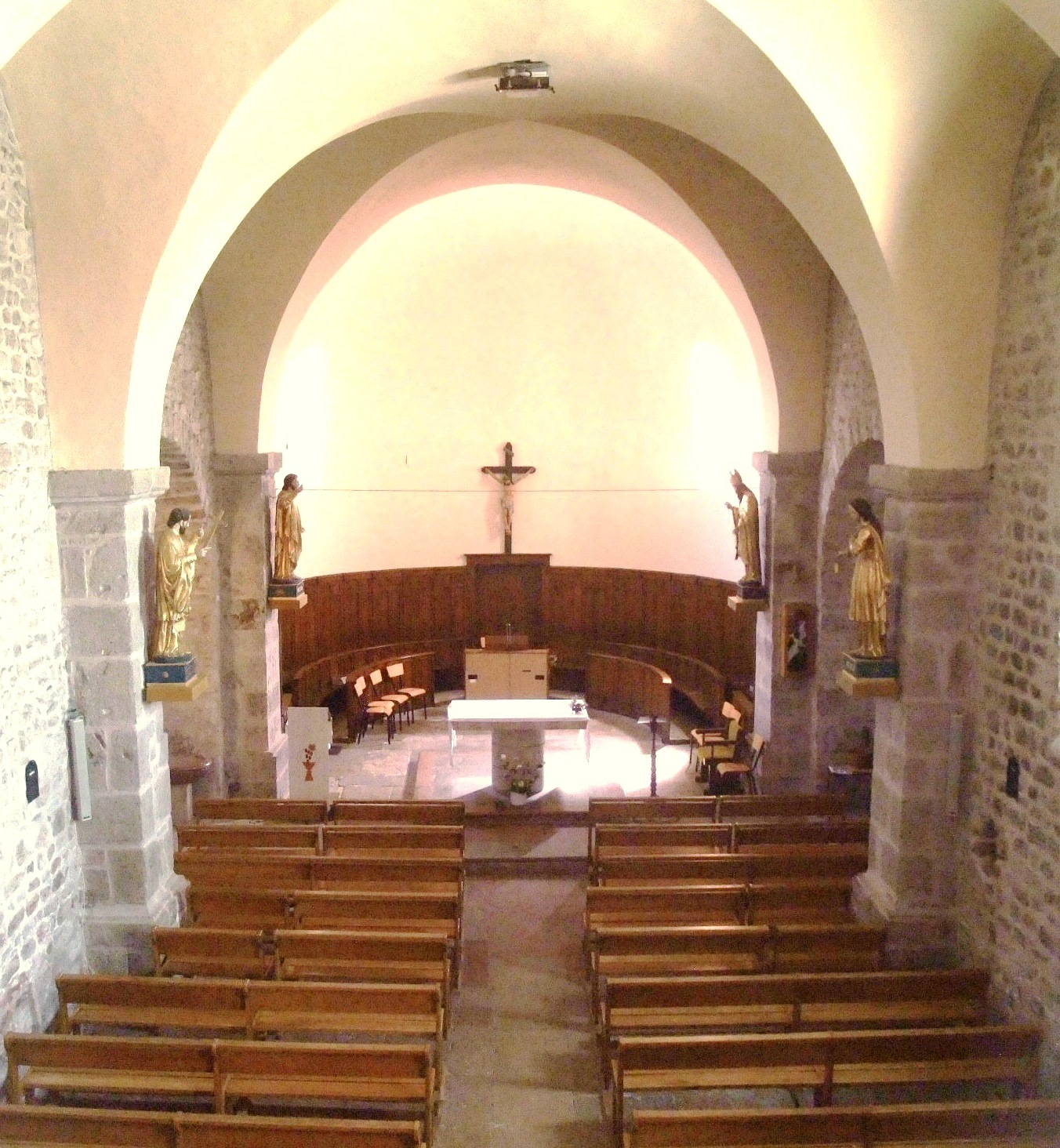 Roiffieux église intérieur